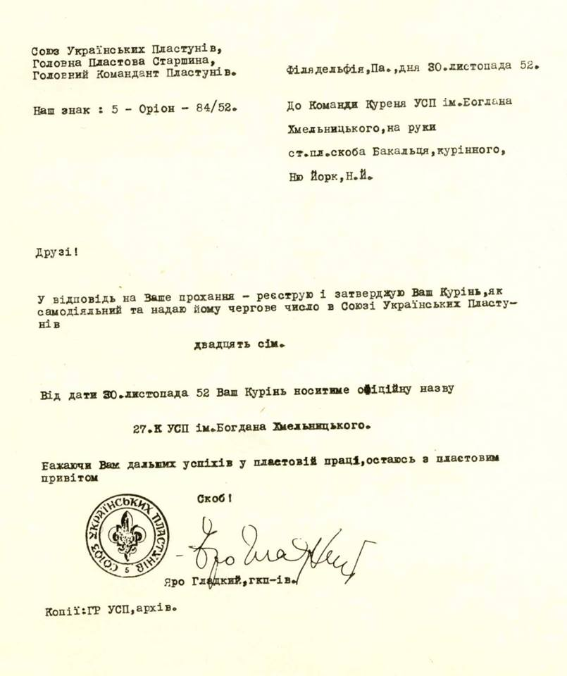 Документ затвердження надання числа Хмельниченкам